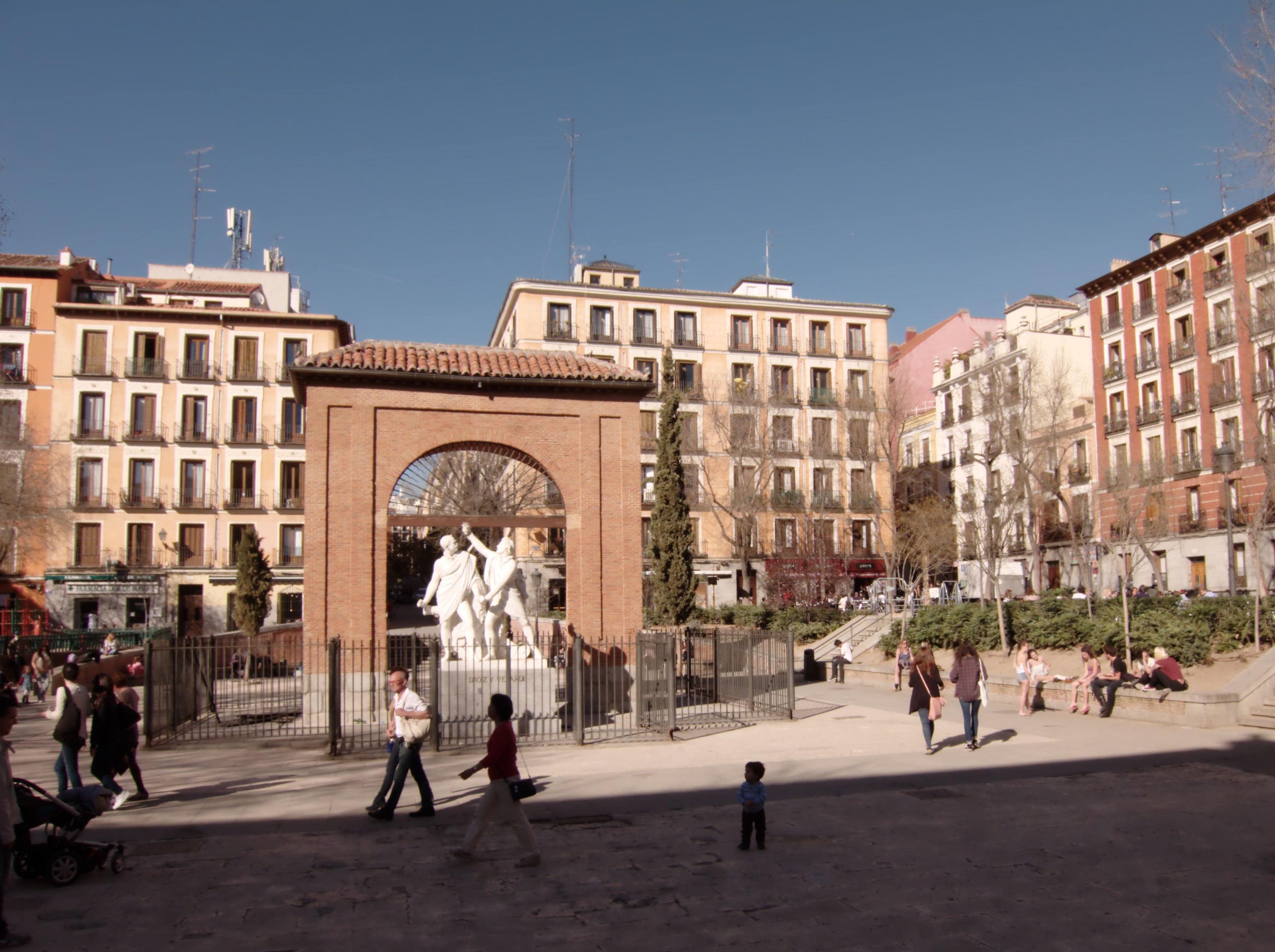 Madrid - Plaza del Dos de Mayo